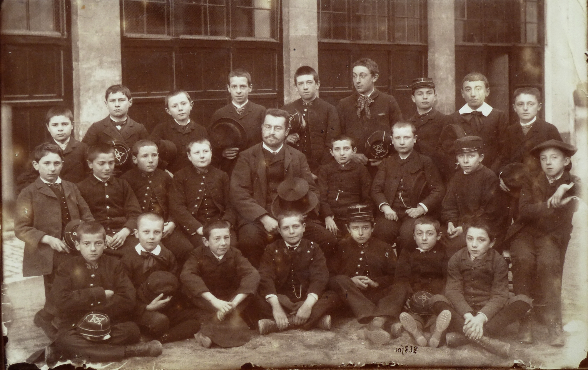 Photo de classe, lycée Pothier à Orléans (Loiret), 1887 . Photographe Jules David. Dimension cliché : 22,5 x 14 cm. Collection privée.